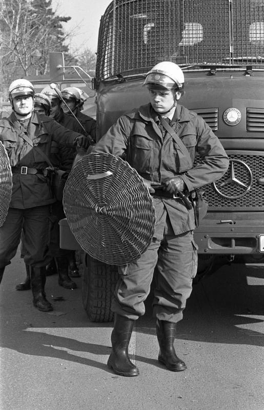 Bauern-Demonstration in Bonn.